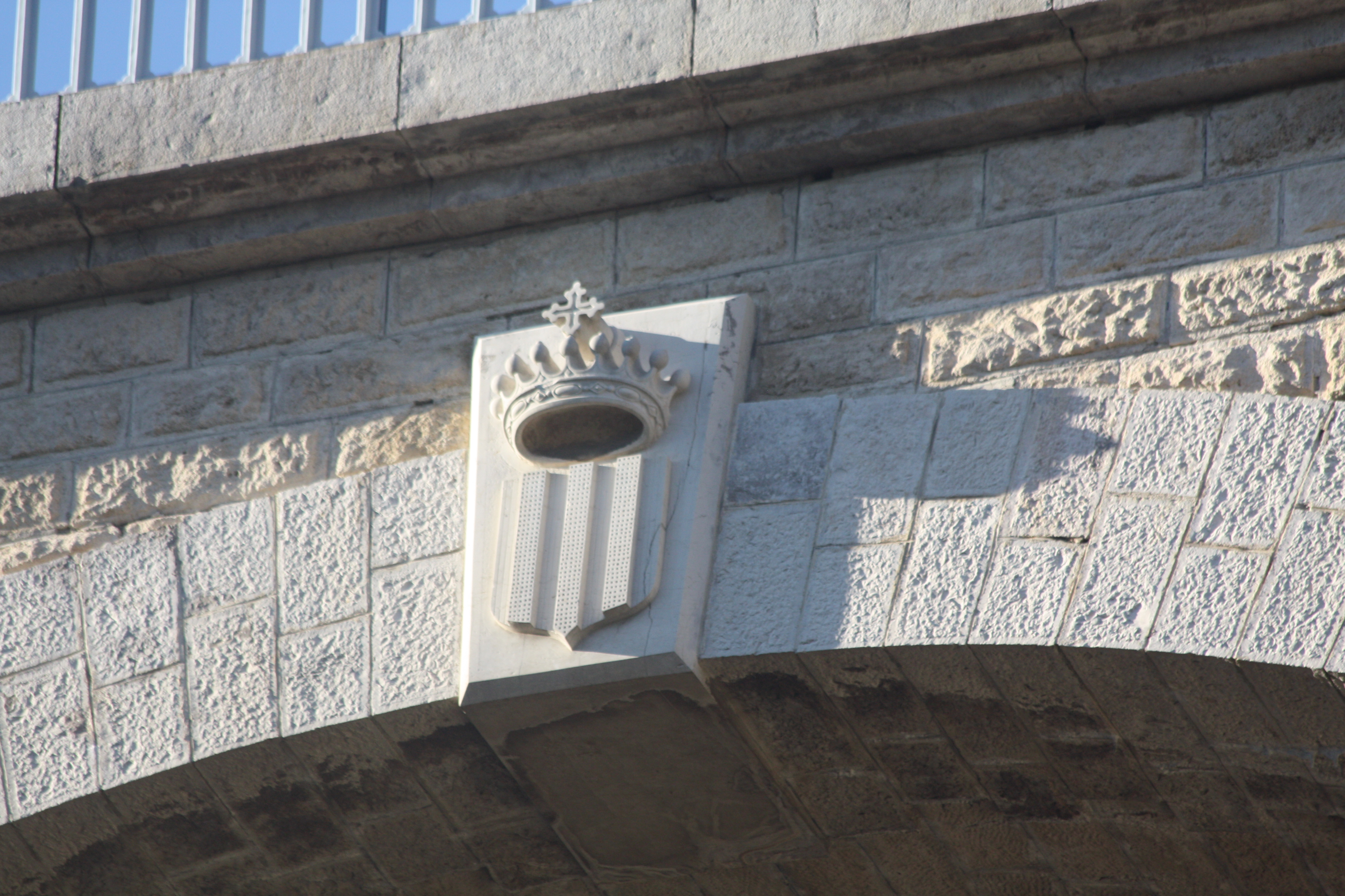 Blason de Forcalquier (viaduc du Viou)